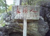 长阳人题字